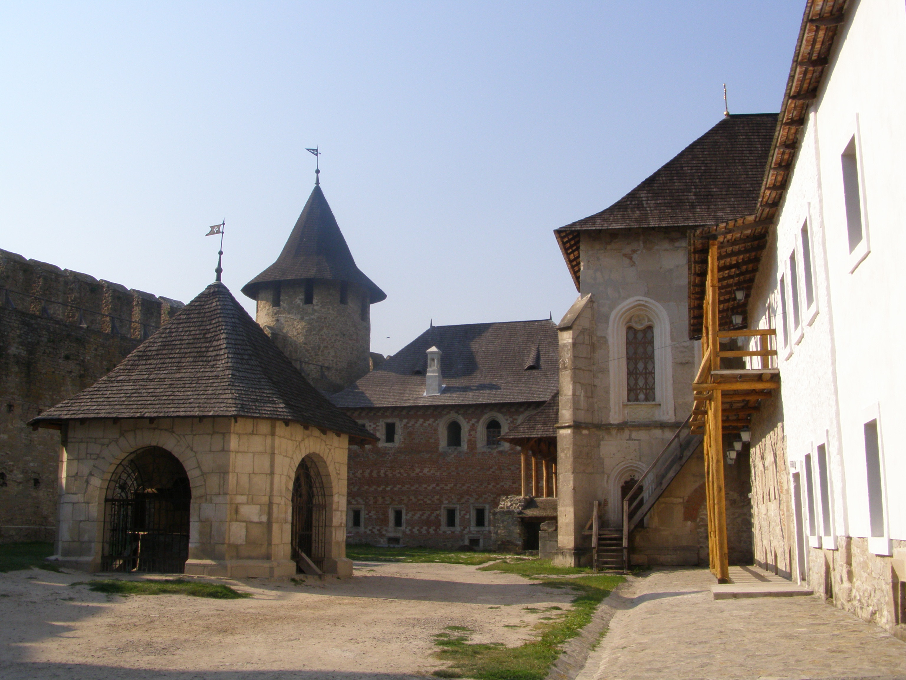 Chotyn, nádvoří pevnosti